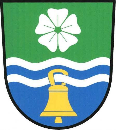 znak,Libňatov , okres Trutnov